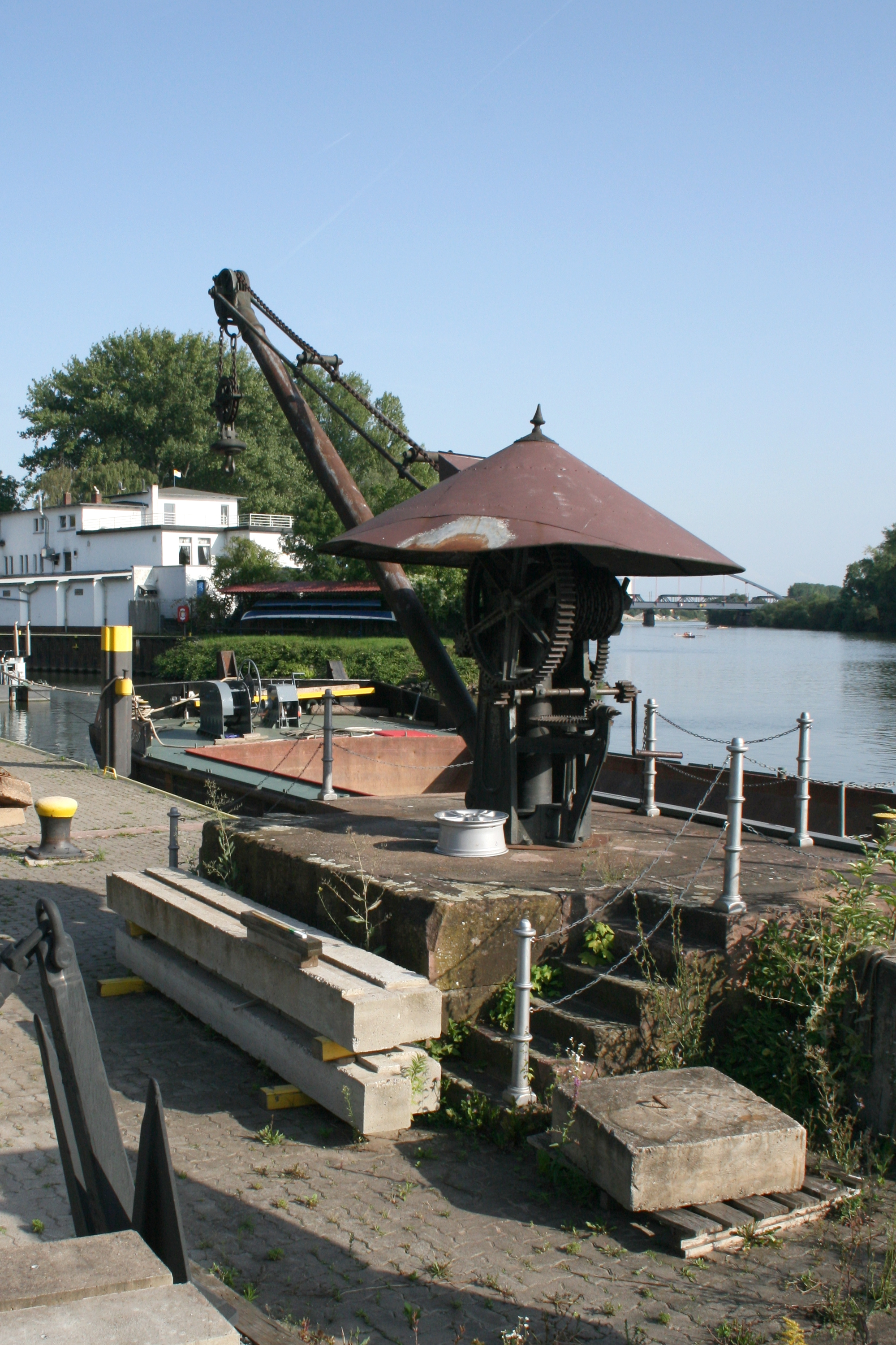 Historischer Kran am Mainzollamt in Hanau.